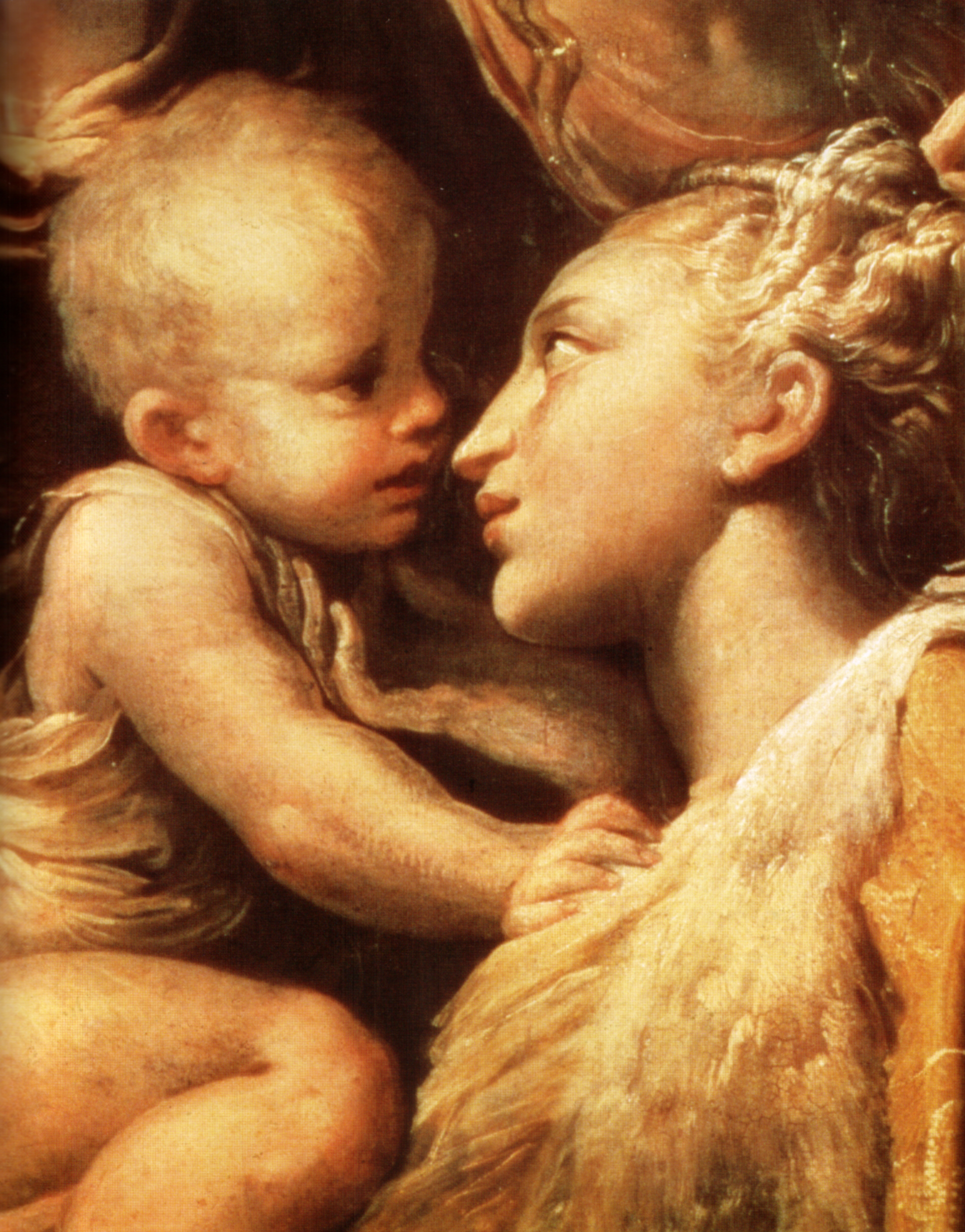 detail